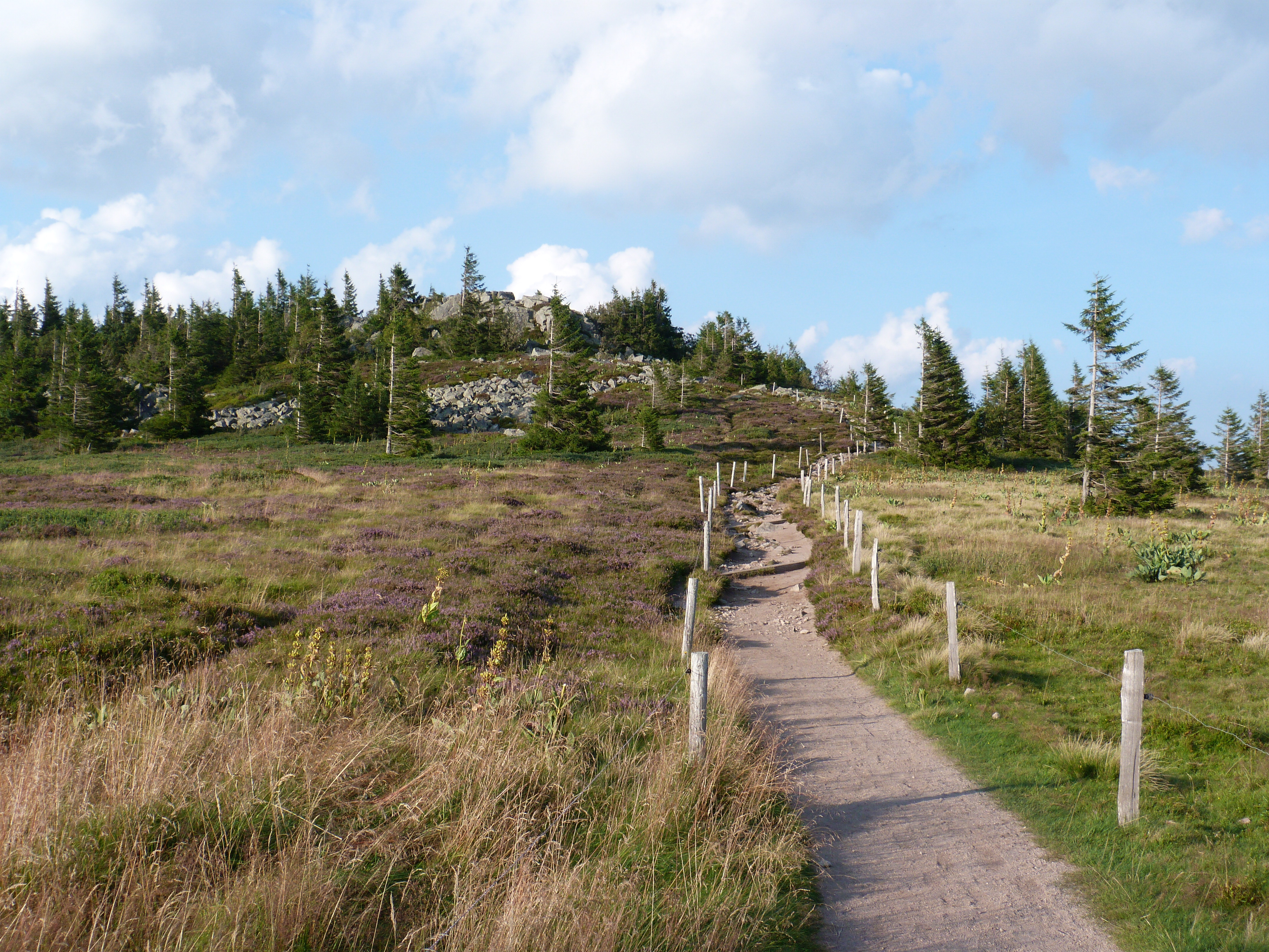 Le Tanet (massif des Vosges).